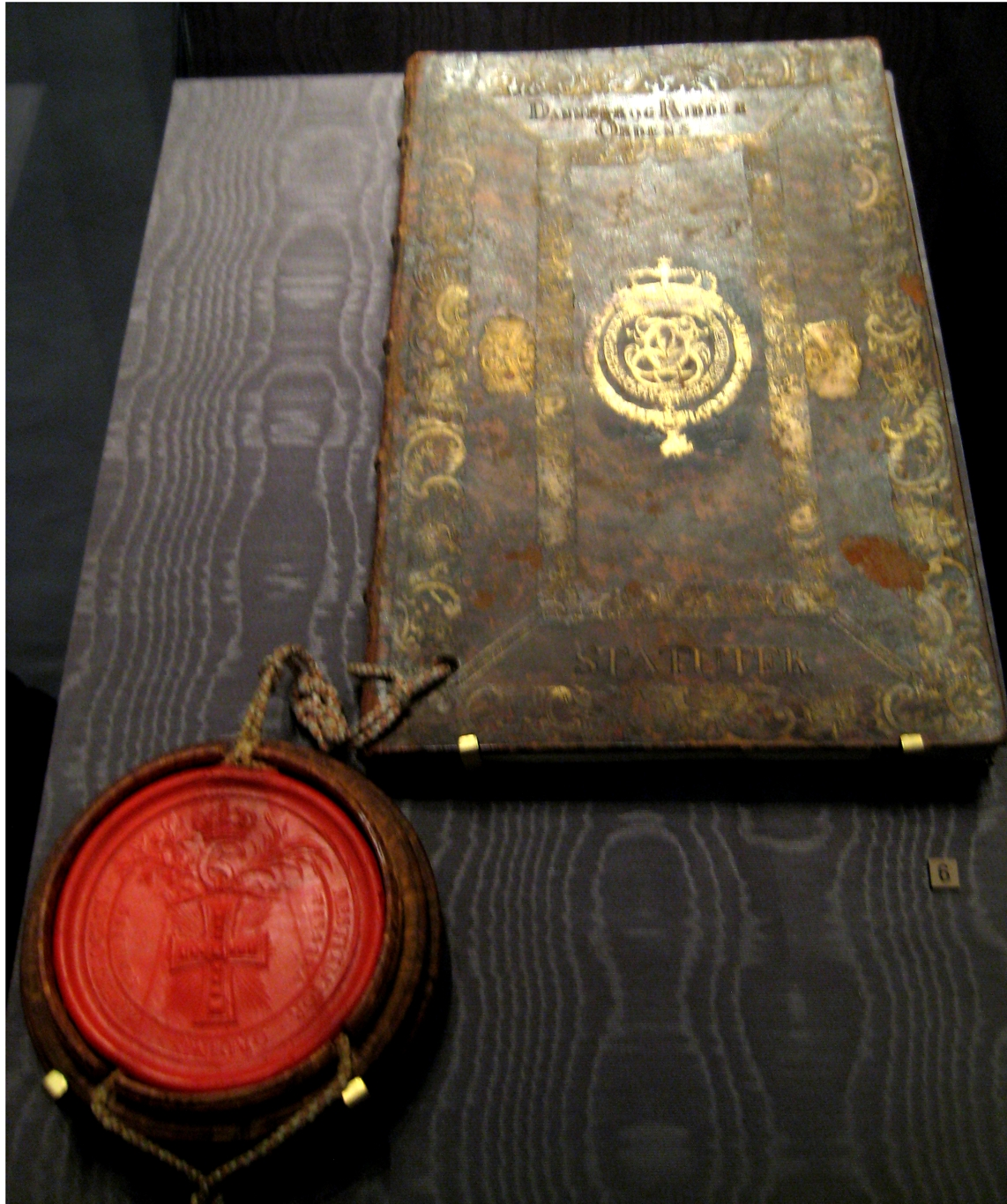 Статуты датского ордена Даннеброга. Присланы Петру I вместе с дипломом и орденскими знаками датского ордена Слона. 1713. Российский государственный архив древних актов